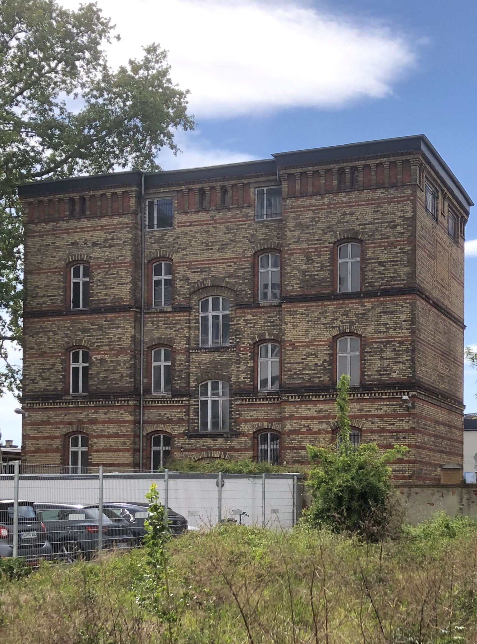 Haus 5 der Polizeiinspektion Nord in Magdeburg, Rückseite, Blick von der Sternstraße